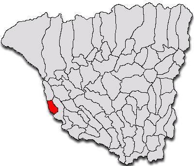 Categorie:Hărţi ale judeţului Gorj